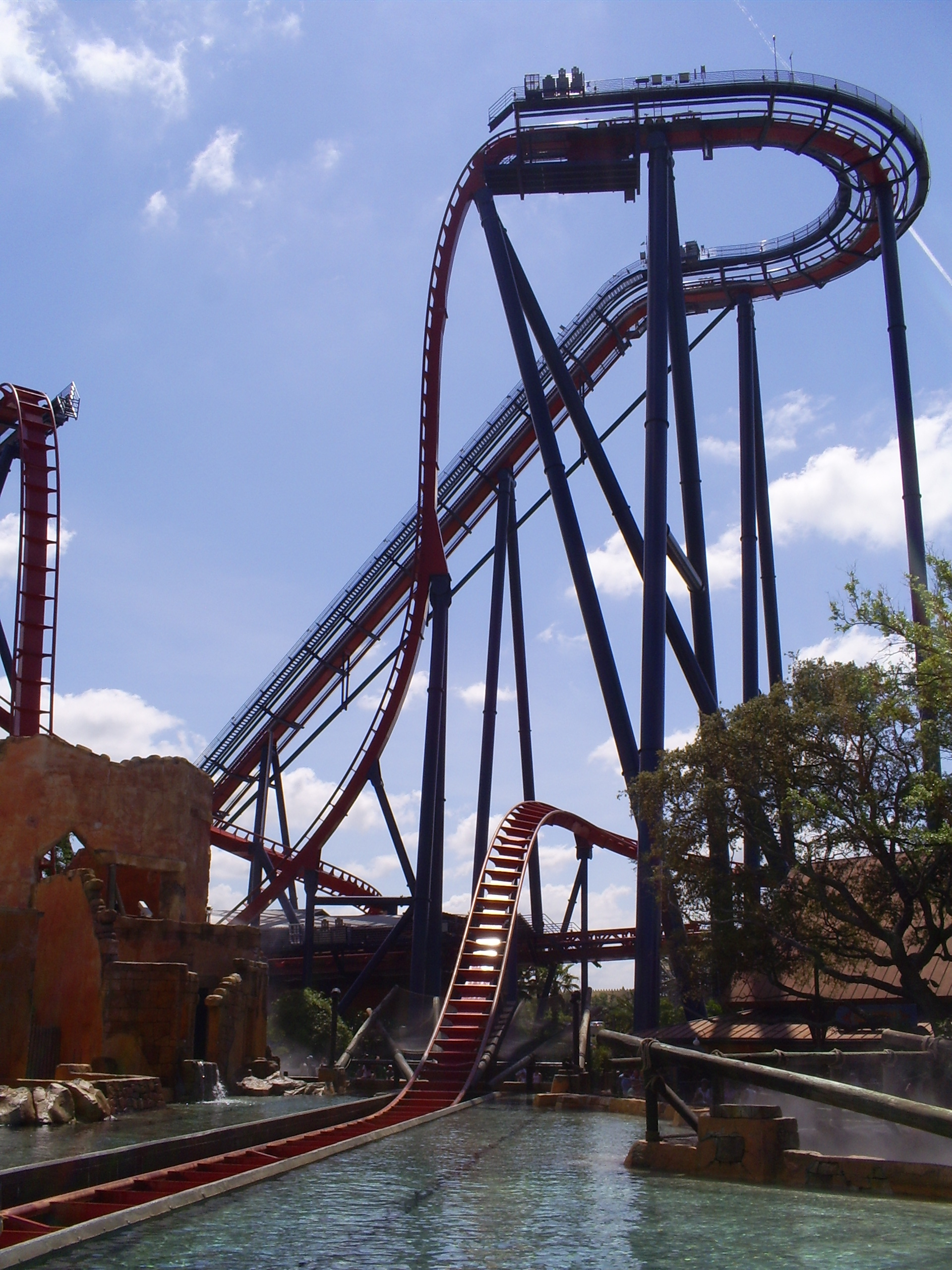 SheiKra, montagnes russes à Busch Gardens Africa